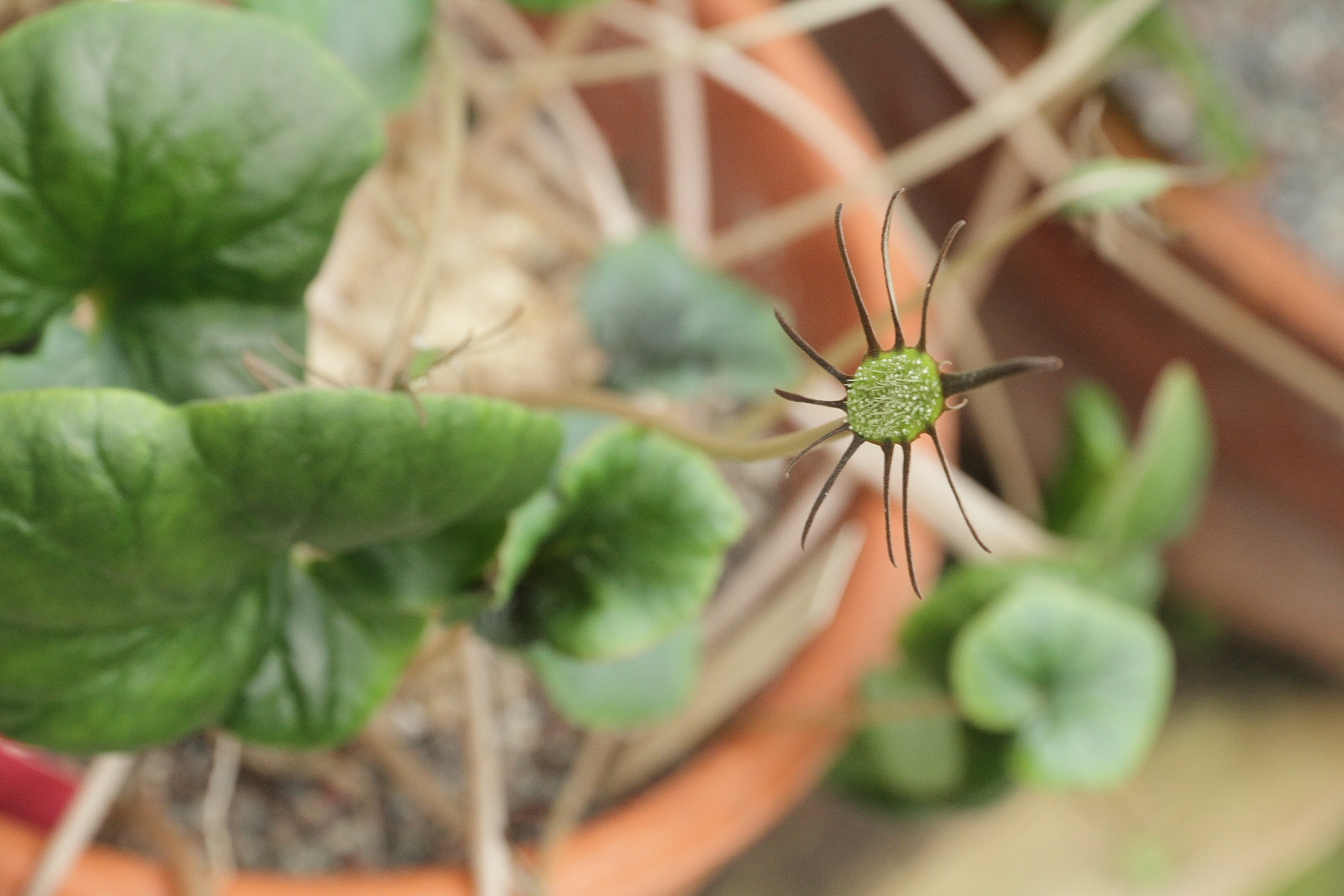 Dorstenia barnimiana i Bergianska trädgården.